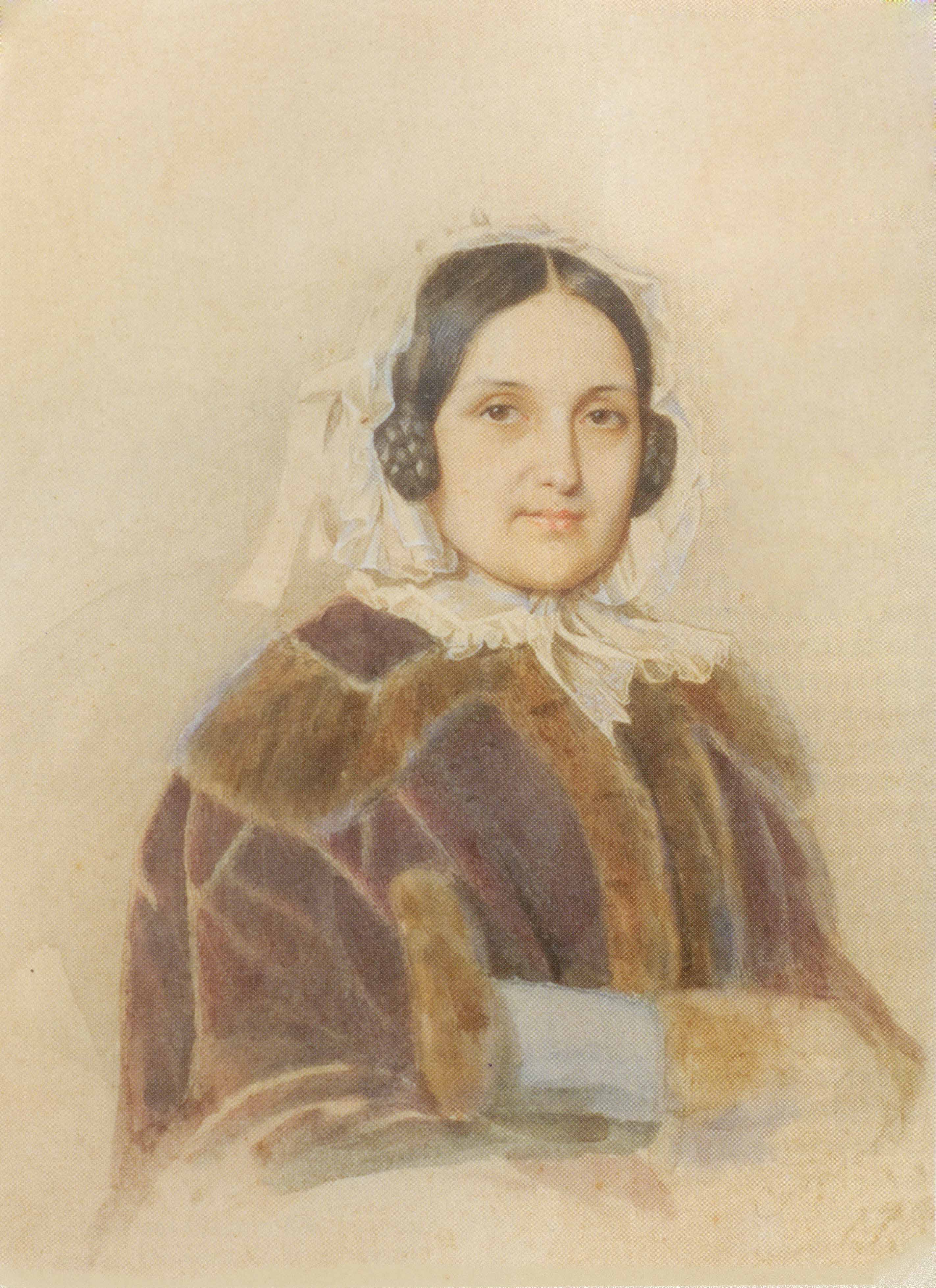 Баронесса Дарья Александровна Врангель, ур. фон Траубенберг (1807-1851), с 1831 года жена барона Георгия Ермолаевича Врангеля (1803-1868), бабушка Н.Н. и П.Н.Врангеля.